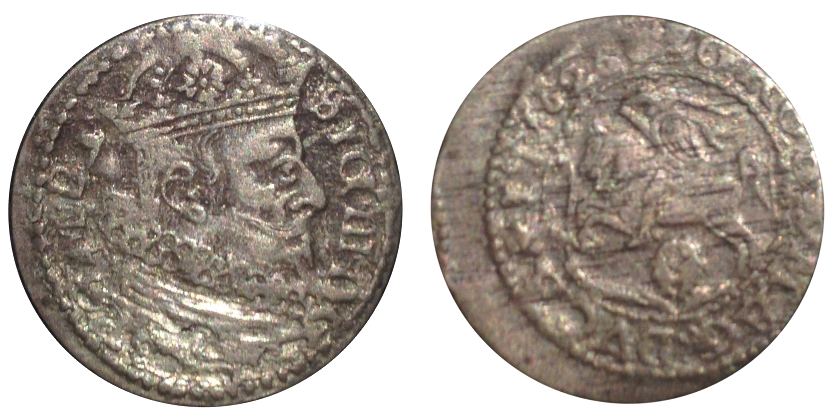 Беларуская (тарашкевіца): 1 грош адбіты ў Вільні ў 1626 годзе за панаваньне Жыгімонта Вазы. З маёй прыватнай калекцыі.